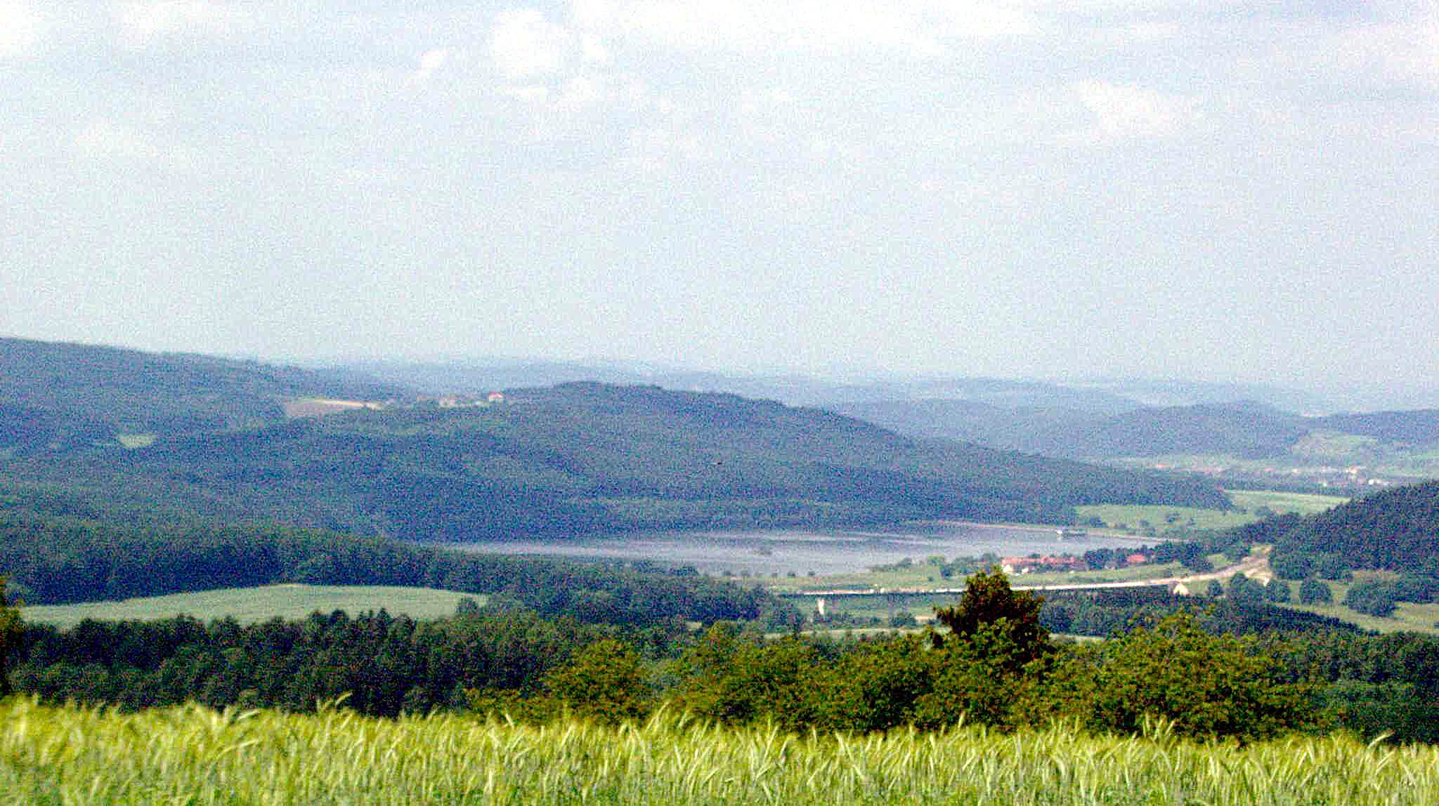 Blick vom Merbelsroder Wachberg (621m) auf die Talsperre Ratscher bei Schleusingen; Thüringer Wald